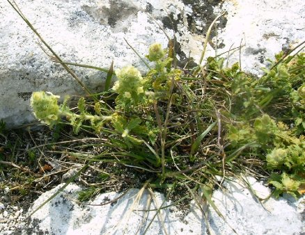 C'est un sous-arbrisseau méditerranéen qu'on rencontre dans les garrigues. Les feuilles veloutées sont fortement dentées. Celles de l'inflorescence sont même épineuses. Les fleurs, d'un jaune pâle, forment un épi allongé. Les dents du calice sont inégales, les supérieures plus longues que les autres, et toutes étalées après la floraison. Sideritis hyssopifolia qui lui ressemble a des feuilles entières, genre feuilles d'hysope. J'ai photographié cette plante sur le plateau des Baux de Provence au mois de mai.